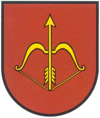 Герб Корсуня-Шевченківського 1585 року